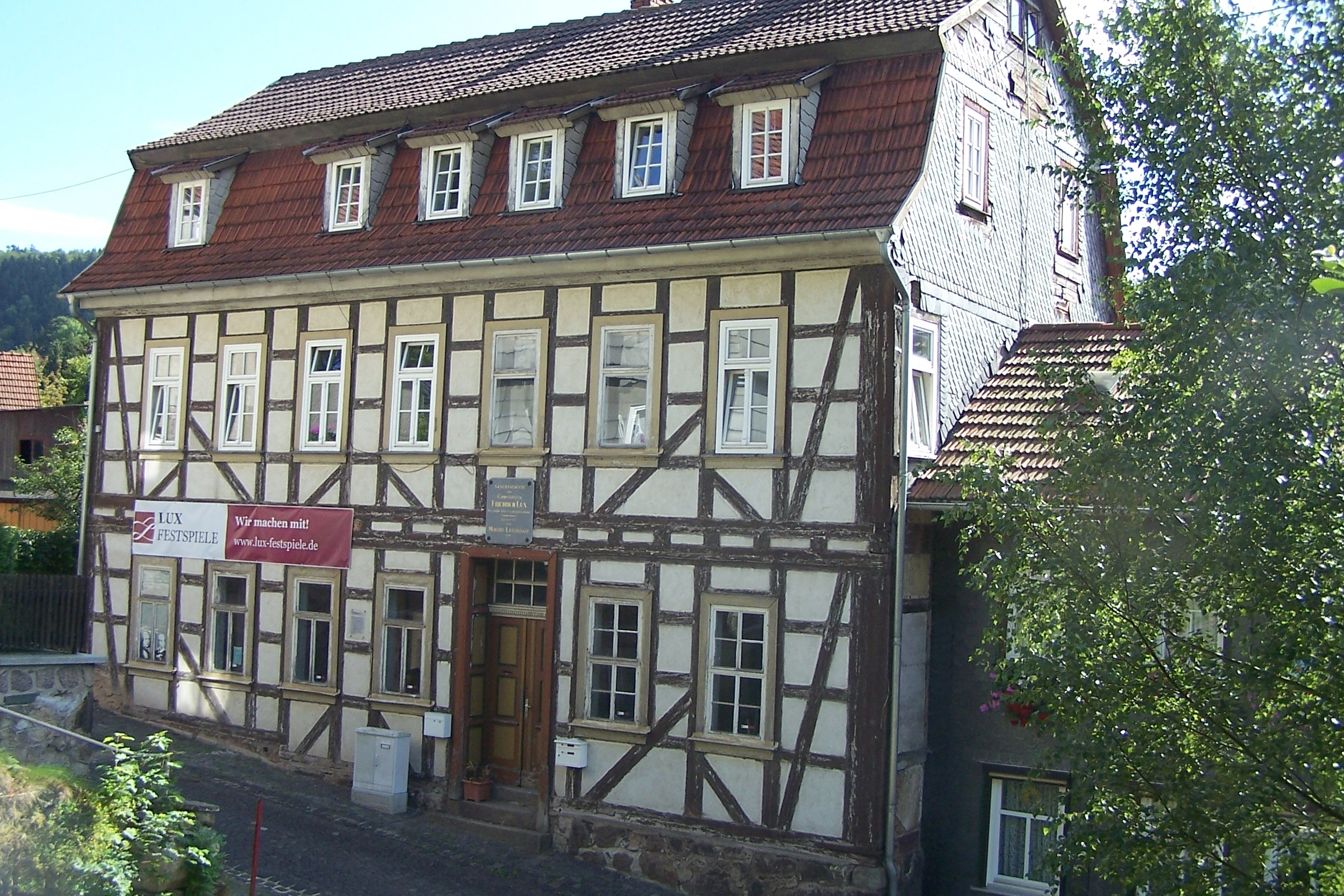 Teilansicht des Hauses mit freigelegter Fachwerkstruktur.